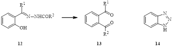 Рисунок 4. 12→13 Реакция Котали-Цунгаса, 14. Бензотриазол